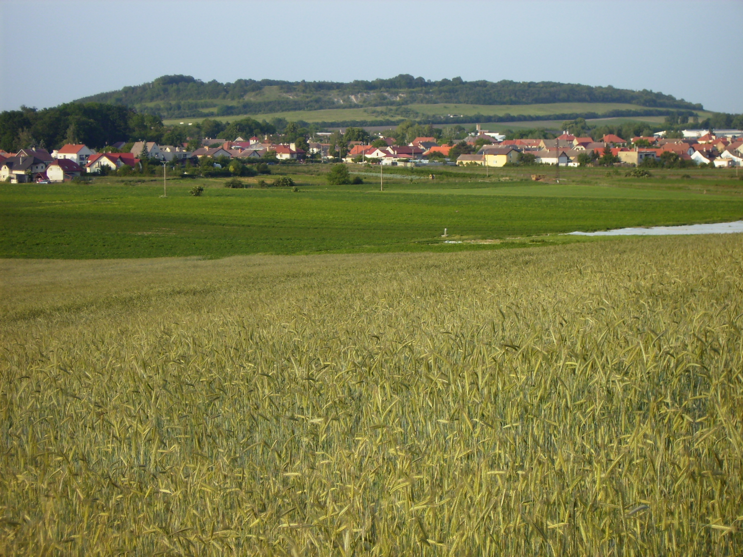 Přerov nad Labem pod Přerovskou hůrou.